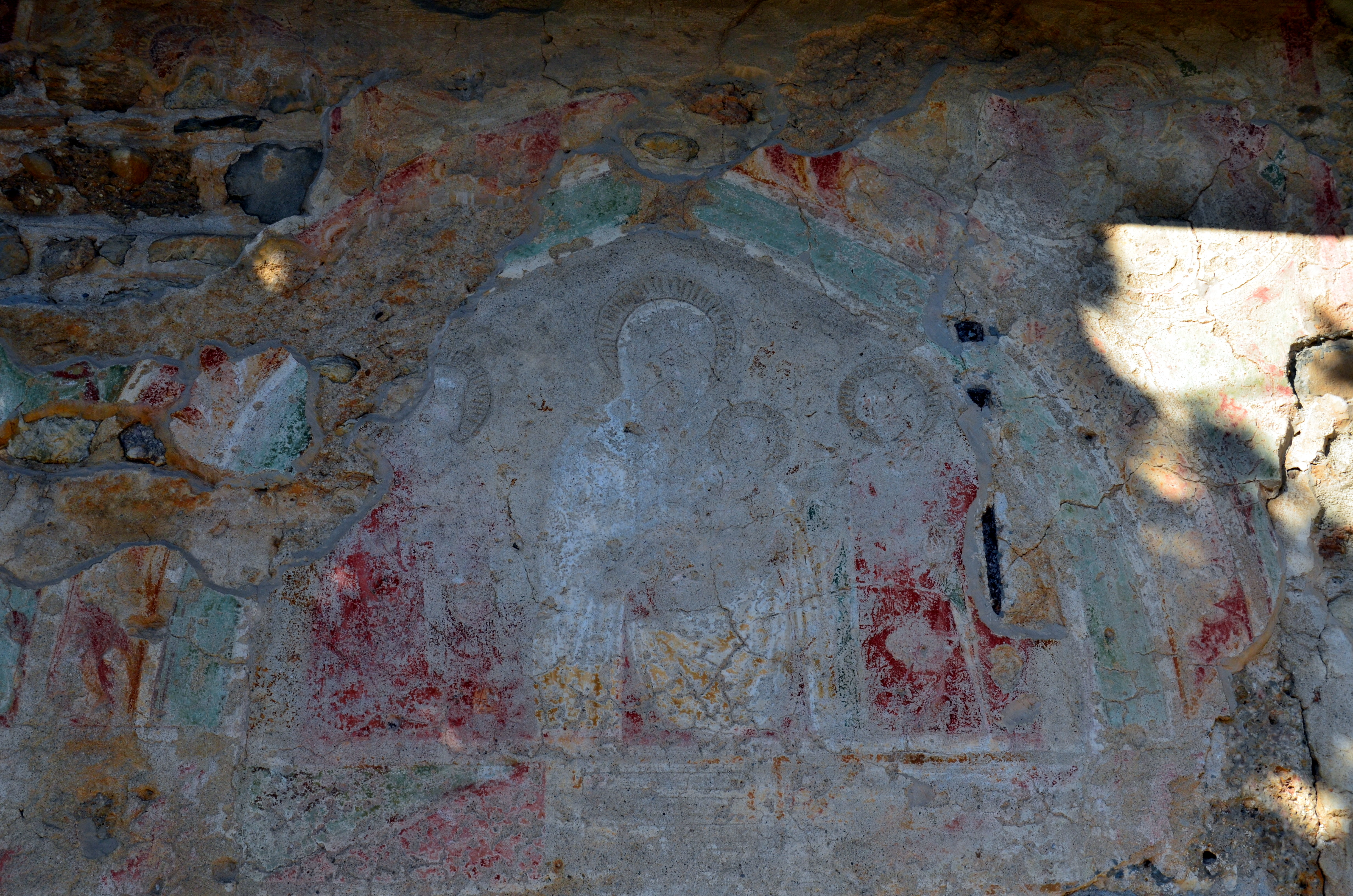 La chiesa di Santo Stefano di Massaro, Bastia, Albenga, Liguria, Italia